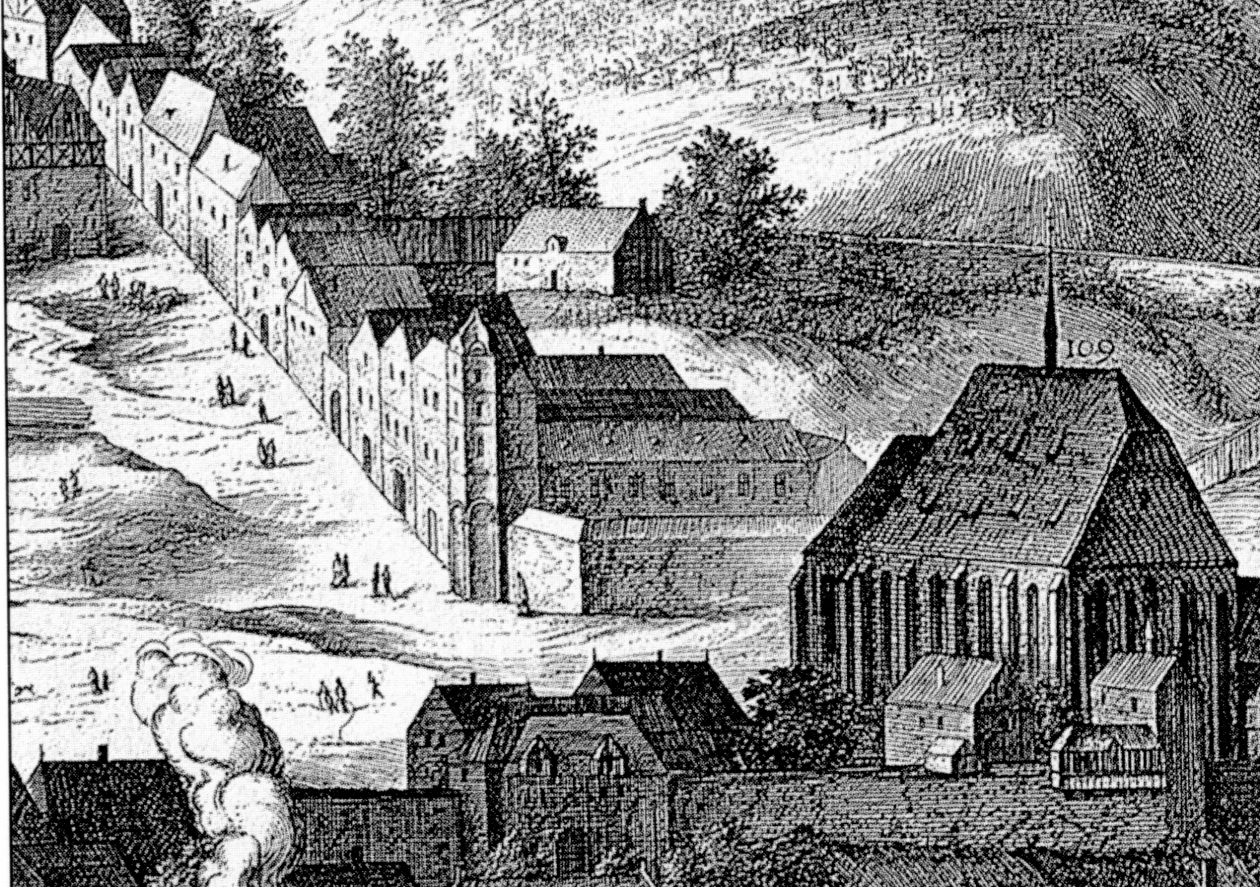 Sadelerův prospekt, list 8, detail Mladotovského paláce. kreslil: Philipp van den Bosche, ryl: Jan Wechter, vydal: Aegidius Sadeler